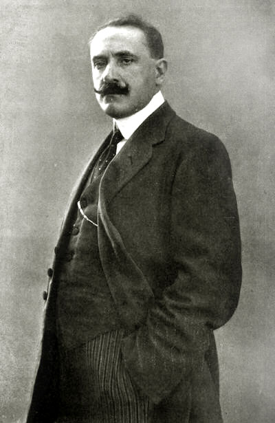 Il regista Giuseppe De Liguoro (1869-1944).